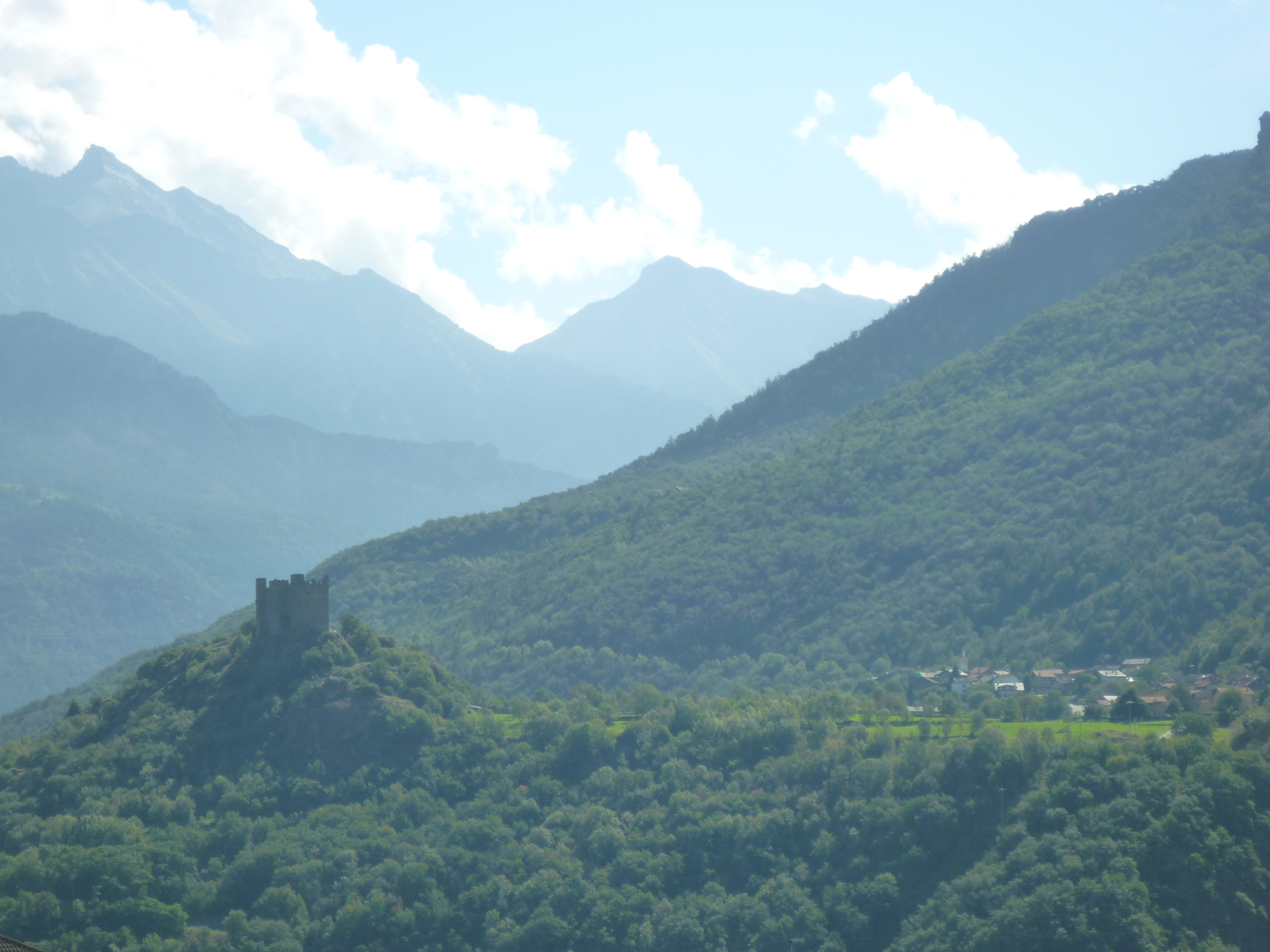 Ussel vu depuis Châtillon (Vallée d'Aoste)